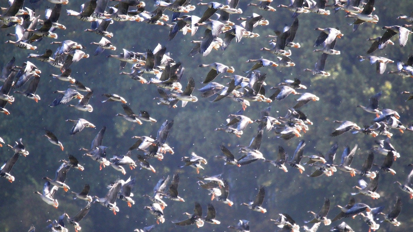 Saatgänse und Blässgänse in Mecklenburg